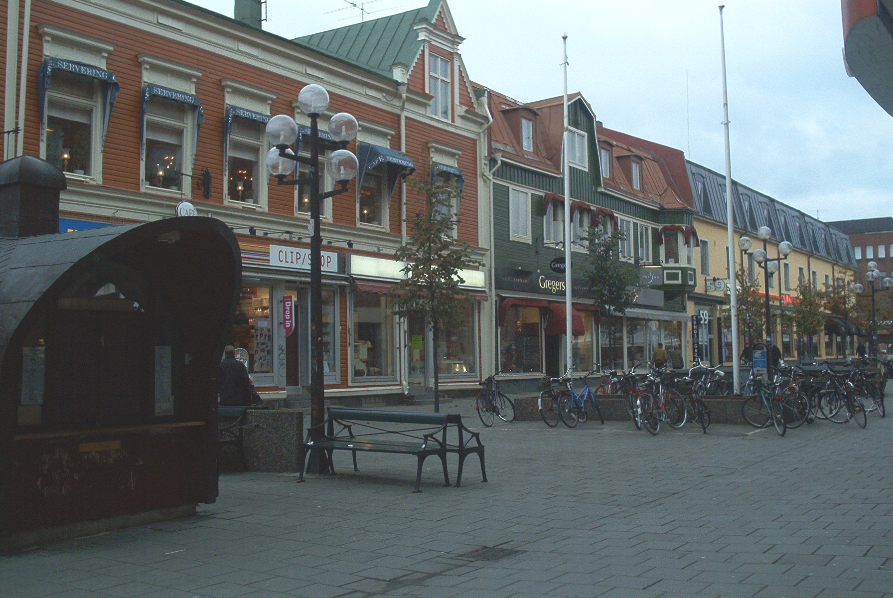 Umeå shopping mall